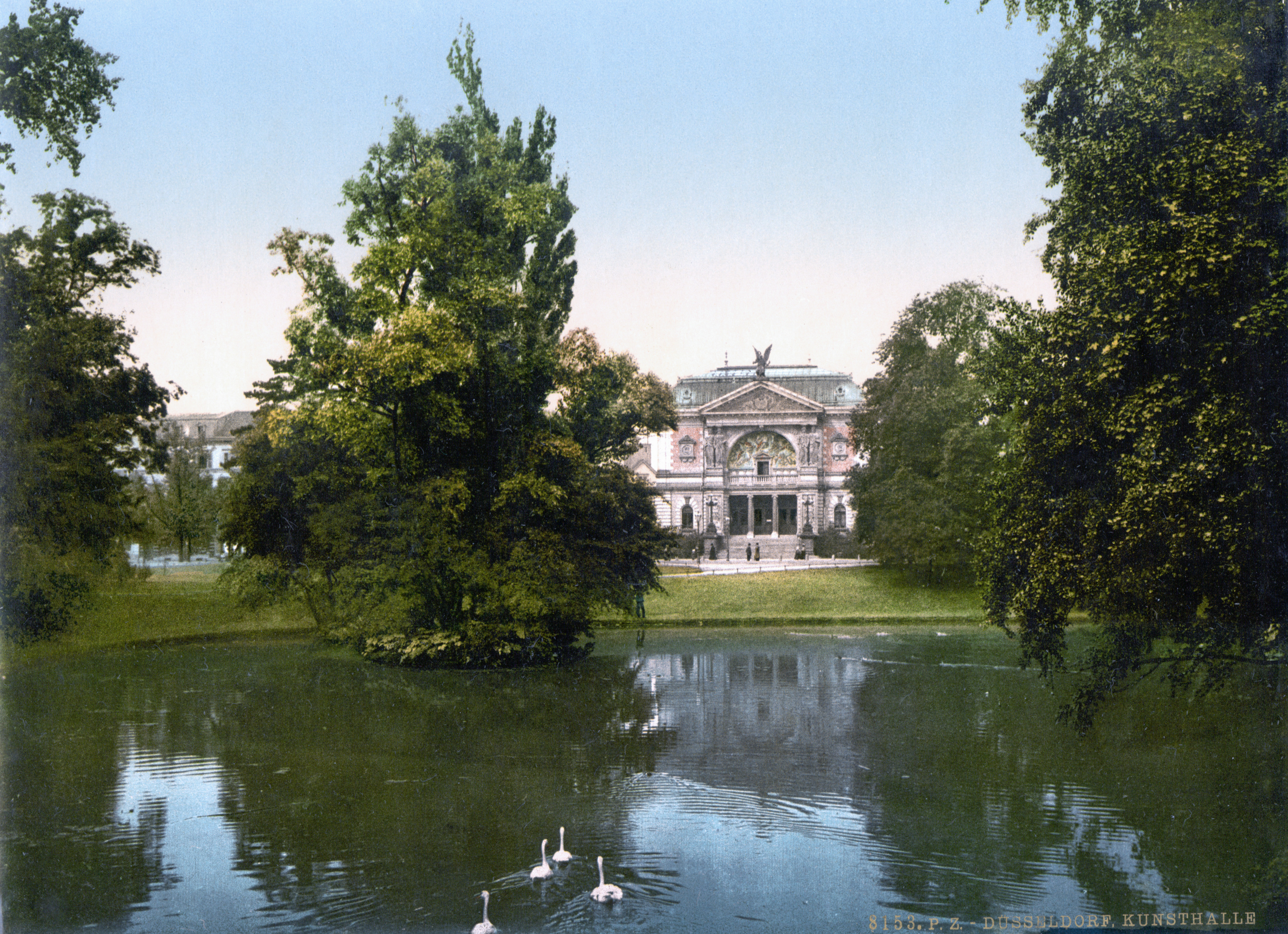 Kunsthalle Düsseldorf um 1900